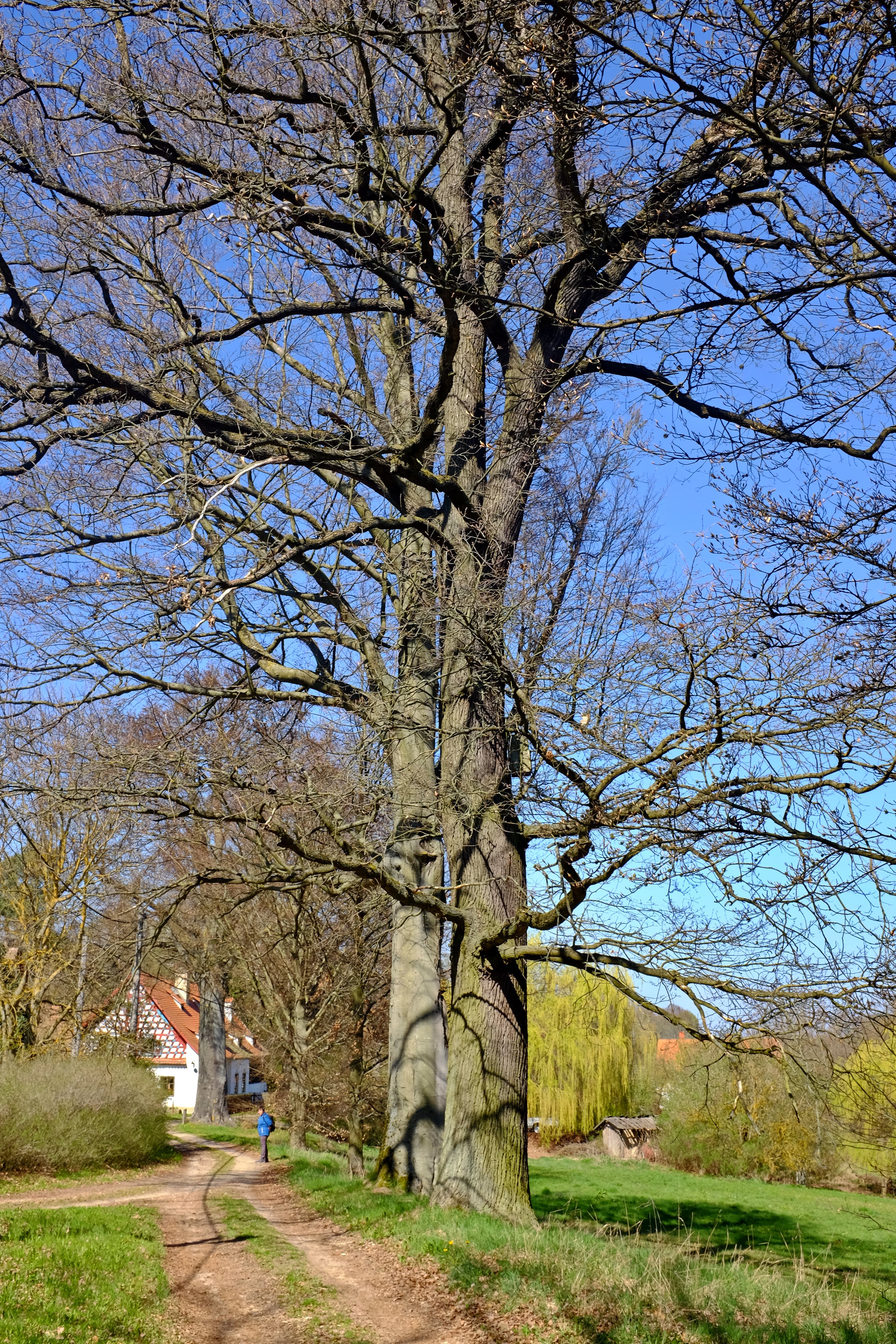 Památné stromy - Buk lesní a dub letní v Doubrava - okres Cheb